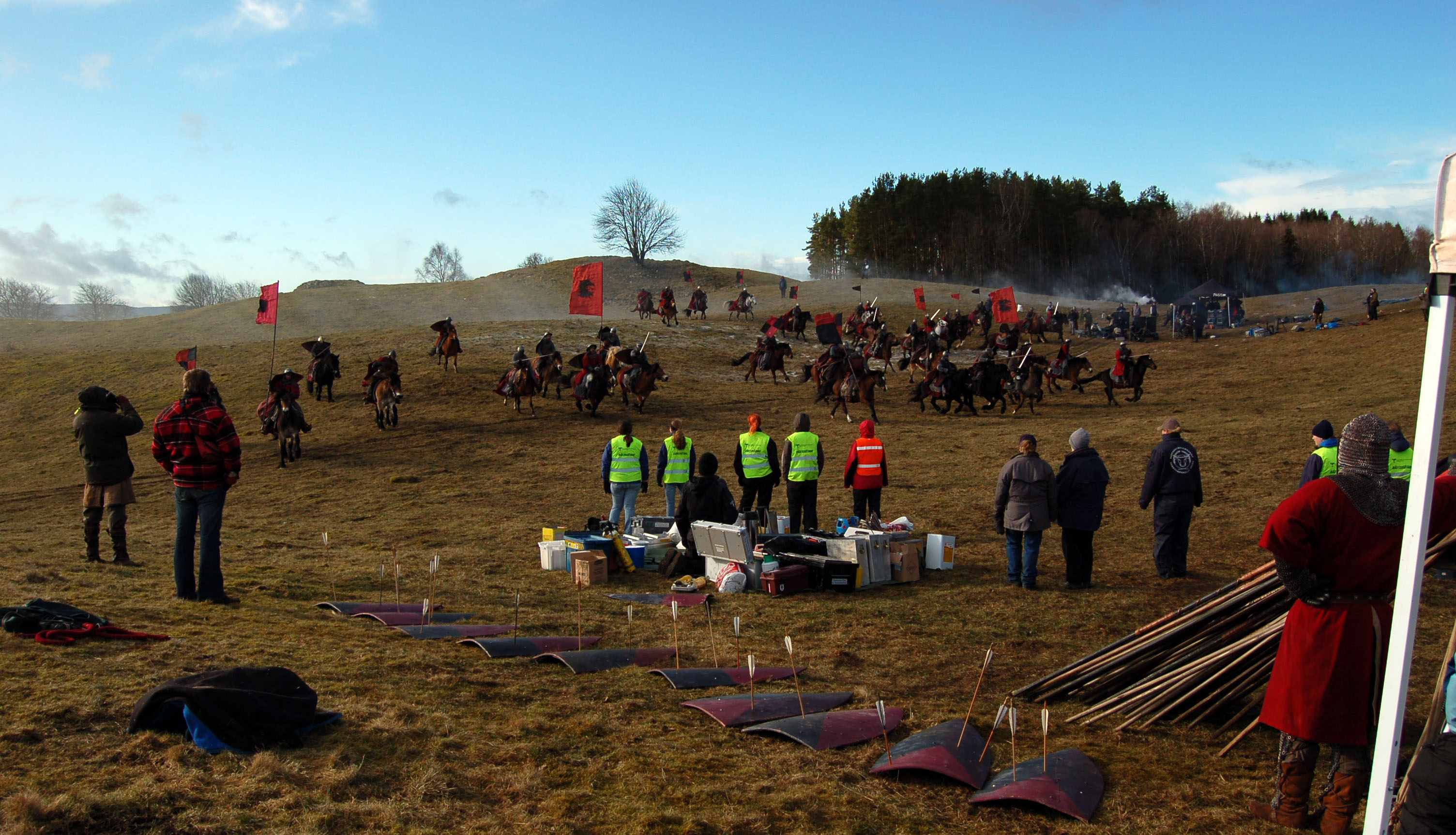 Inspelning av Arn-filmerna